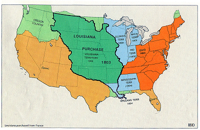 kaart Louisiana Purchase